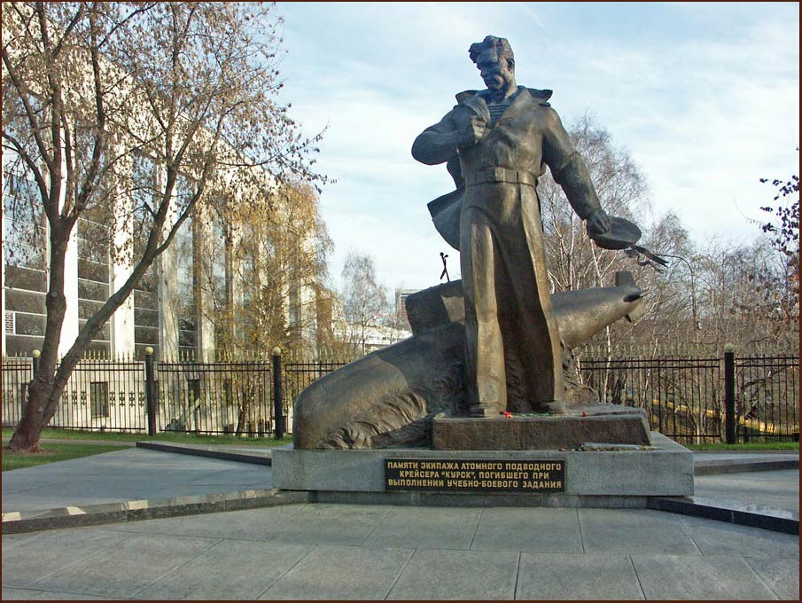 Экипажу подлодки "Курск"